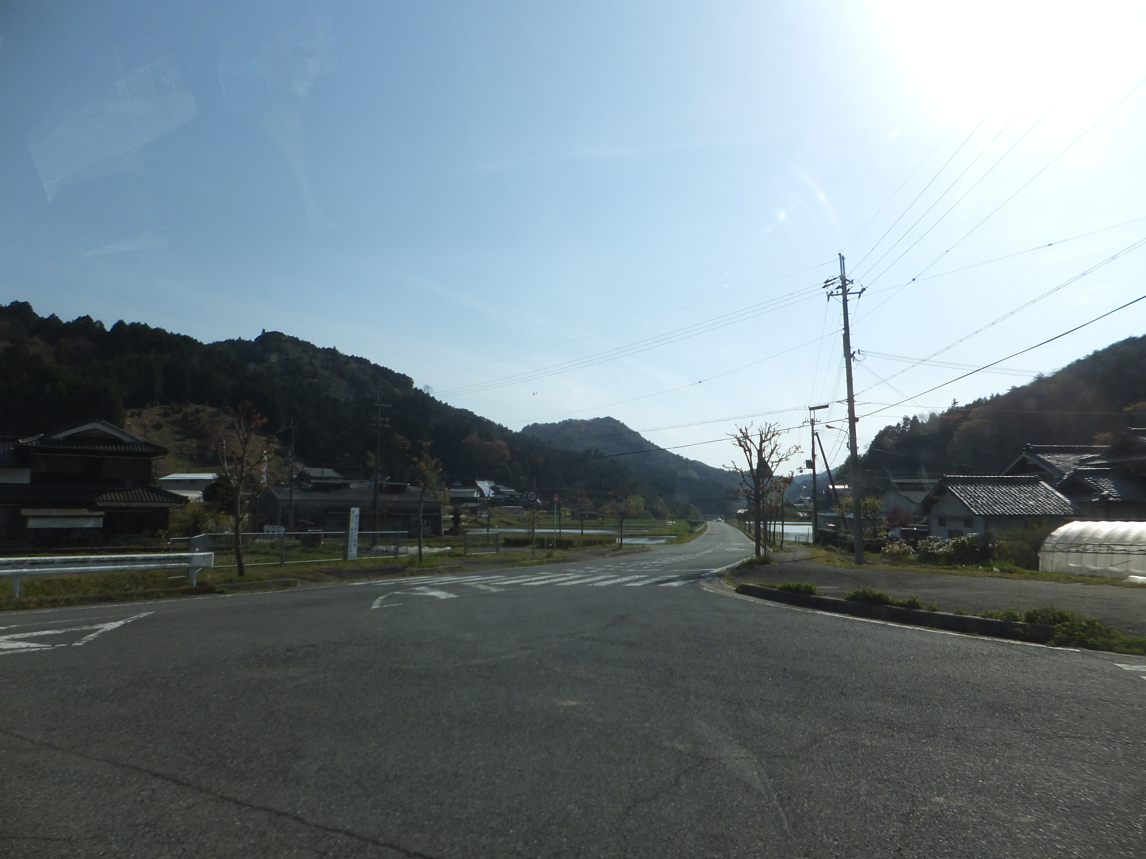 兵庫県三田市母子 兵庫県道308号曽地中三田線